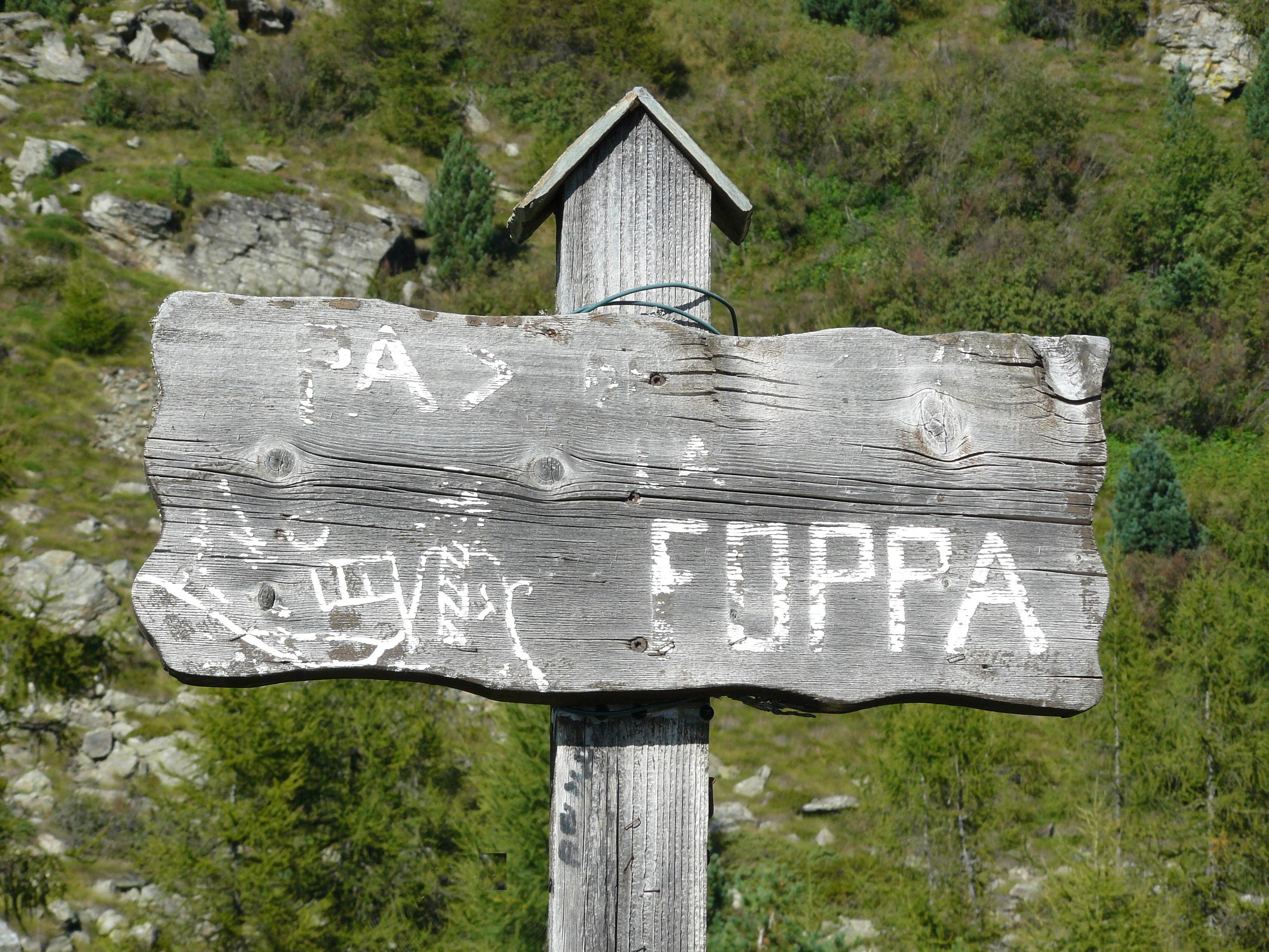 Altes Passschild des Passo della Foppa (Aufgenommen am 09.09.2008)